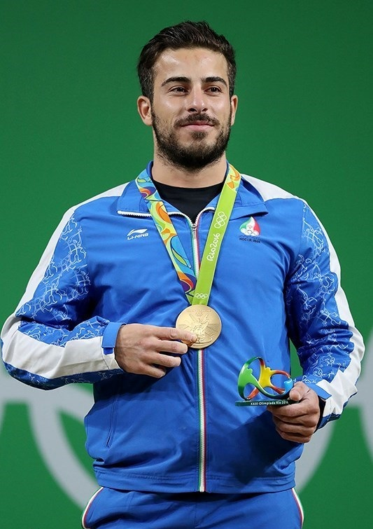 کیانوش رستمی در بازی‌های المپیک تابستانی ۲۰۱۶